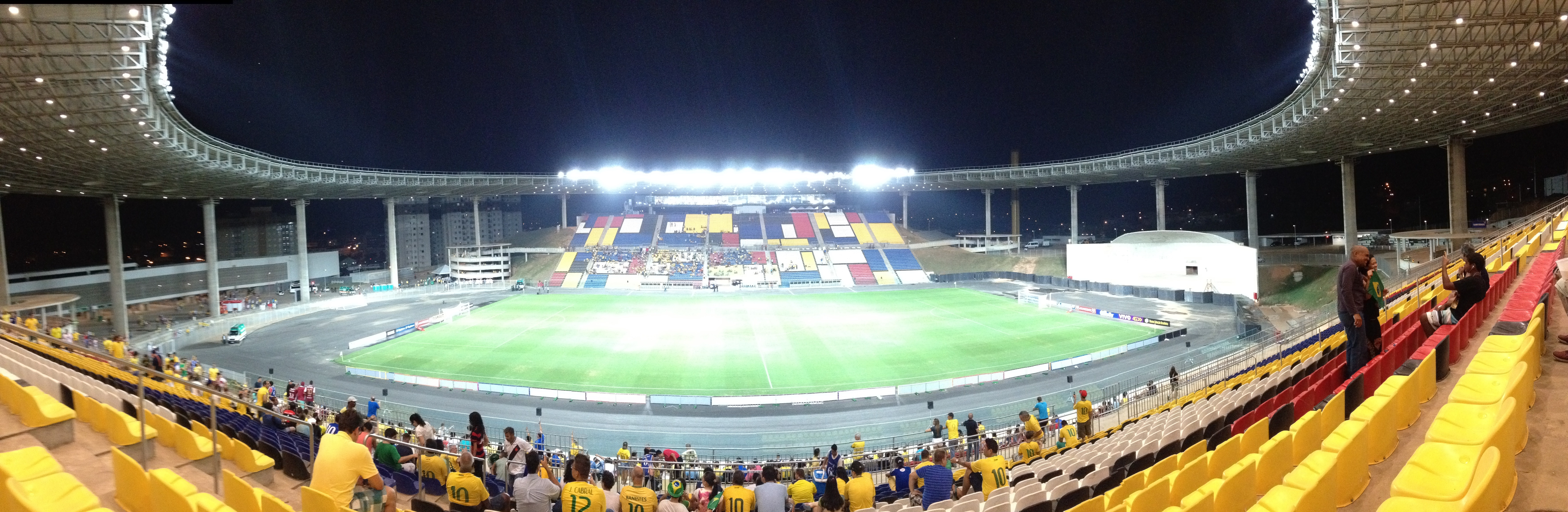 Imagem do Estádio Kleber Andrade no dia 27/03/2015